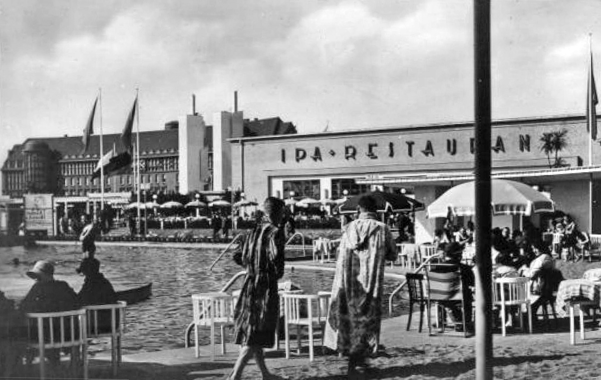 Bad und Restaurant im Vergnügungspark der Internationalen Pelzfach-Ausstellung 1930 in Leipzig. Im Hintergrund die Deutsche Bücherei.